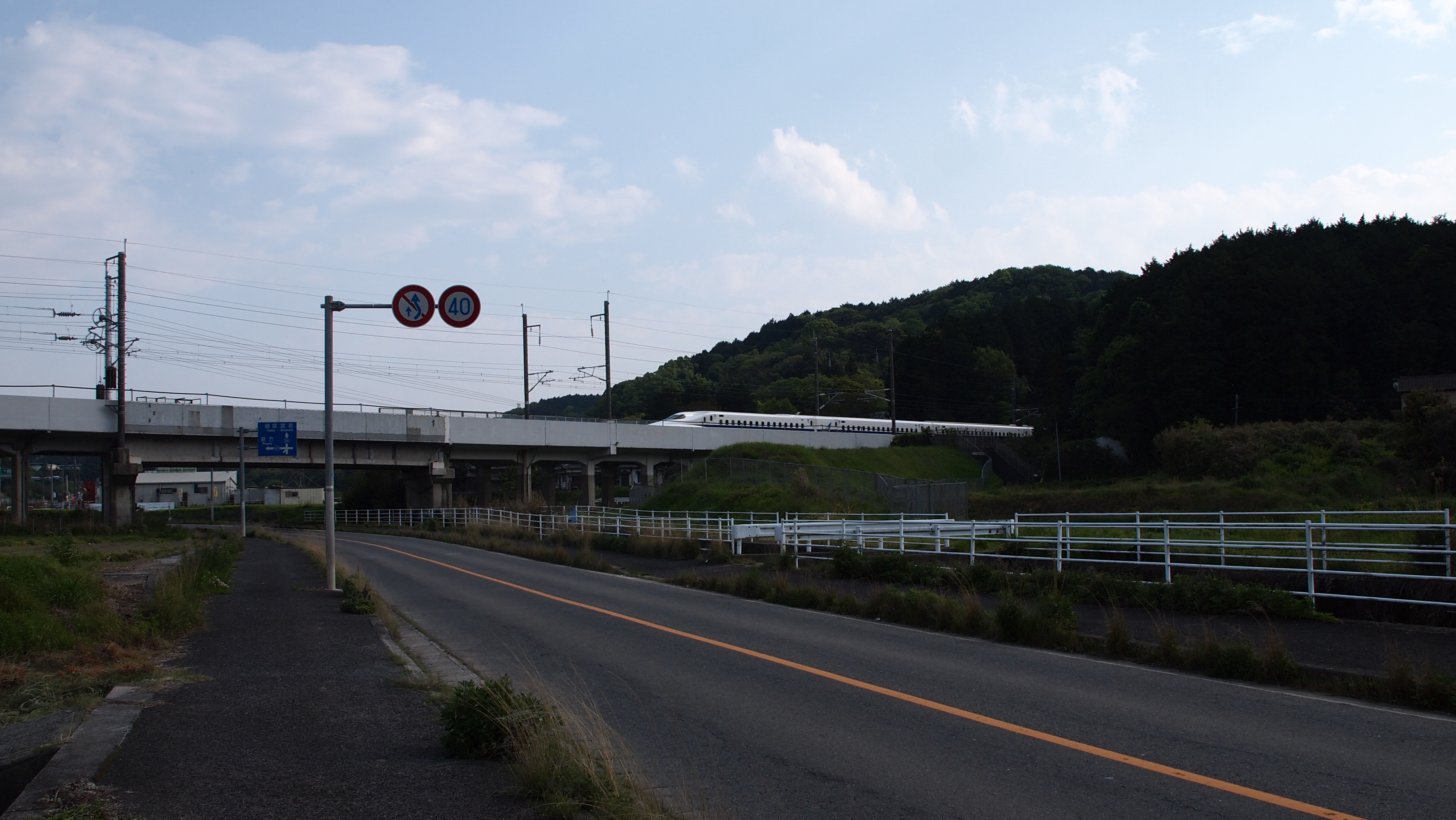 室木駅から新幹線の軌道敷設のために延ばされていた仮線の跡